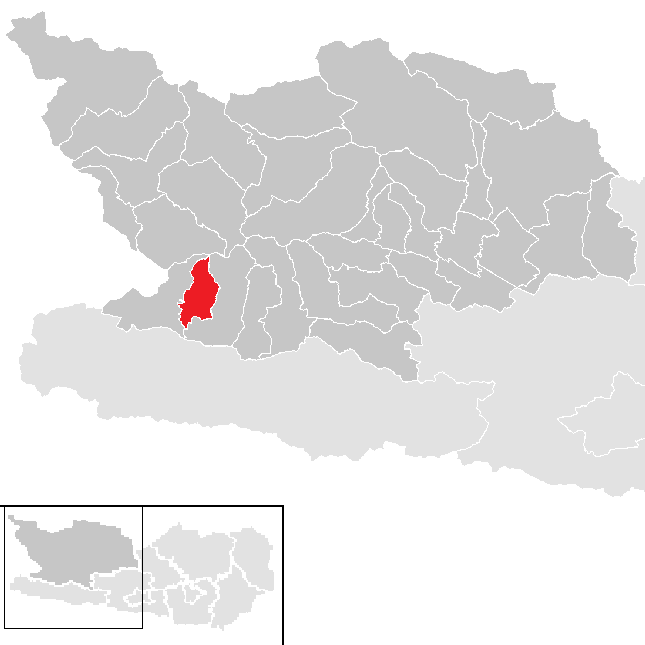 Bezirk Spittal an der Drau